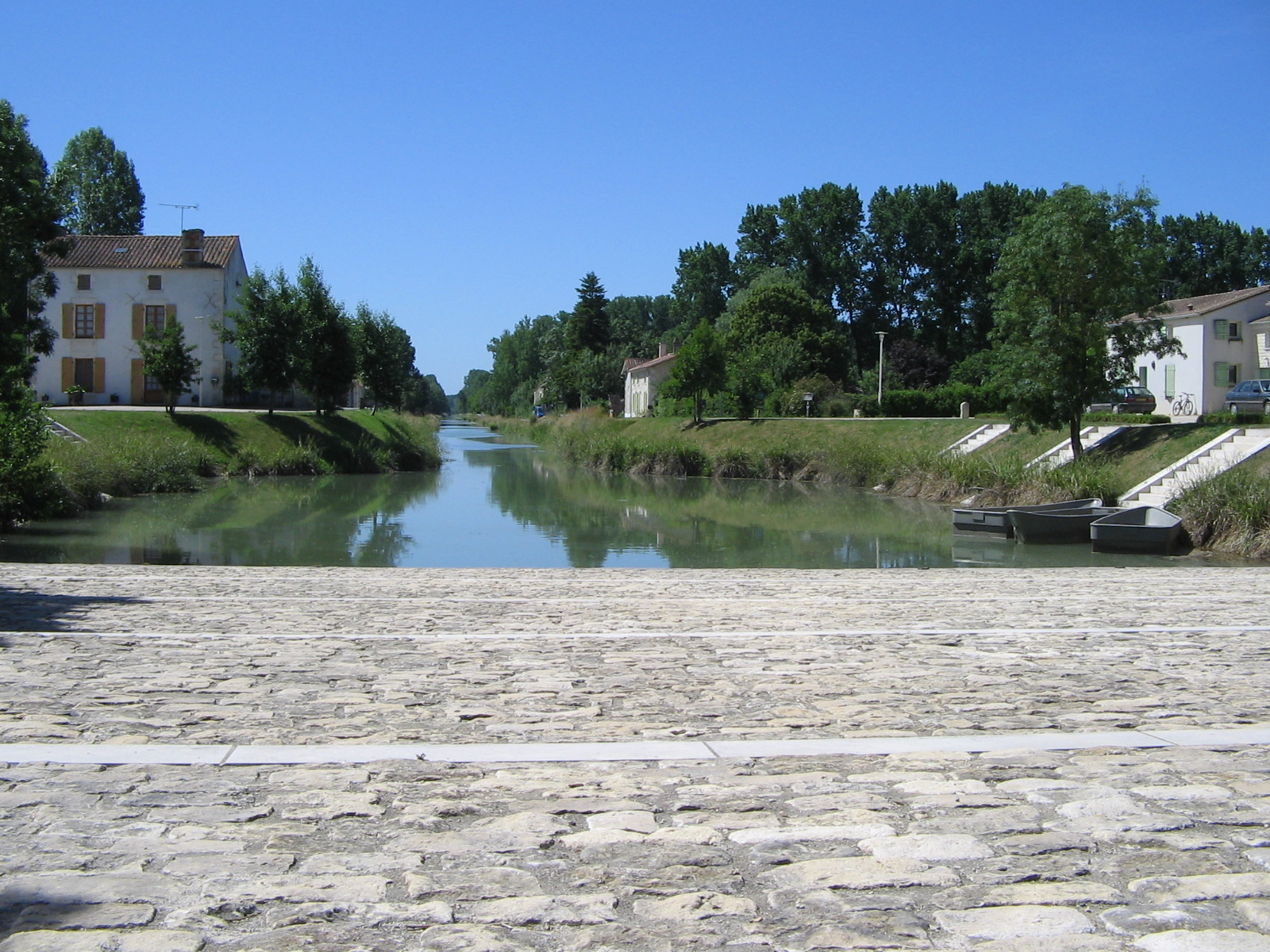 Le port de Courdault en mai 2011